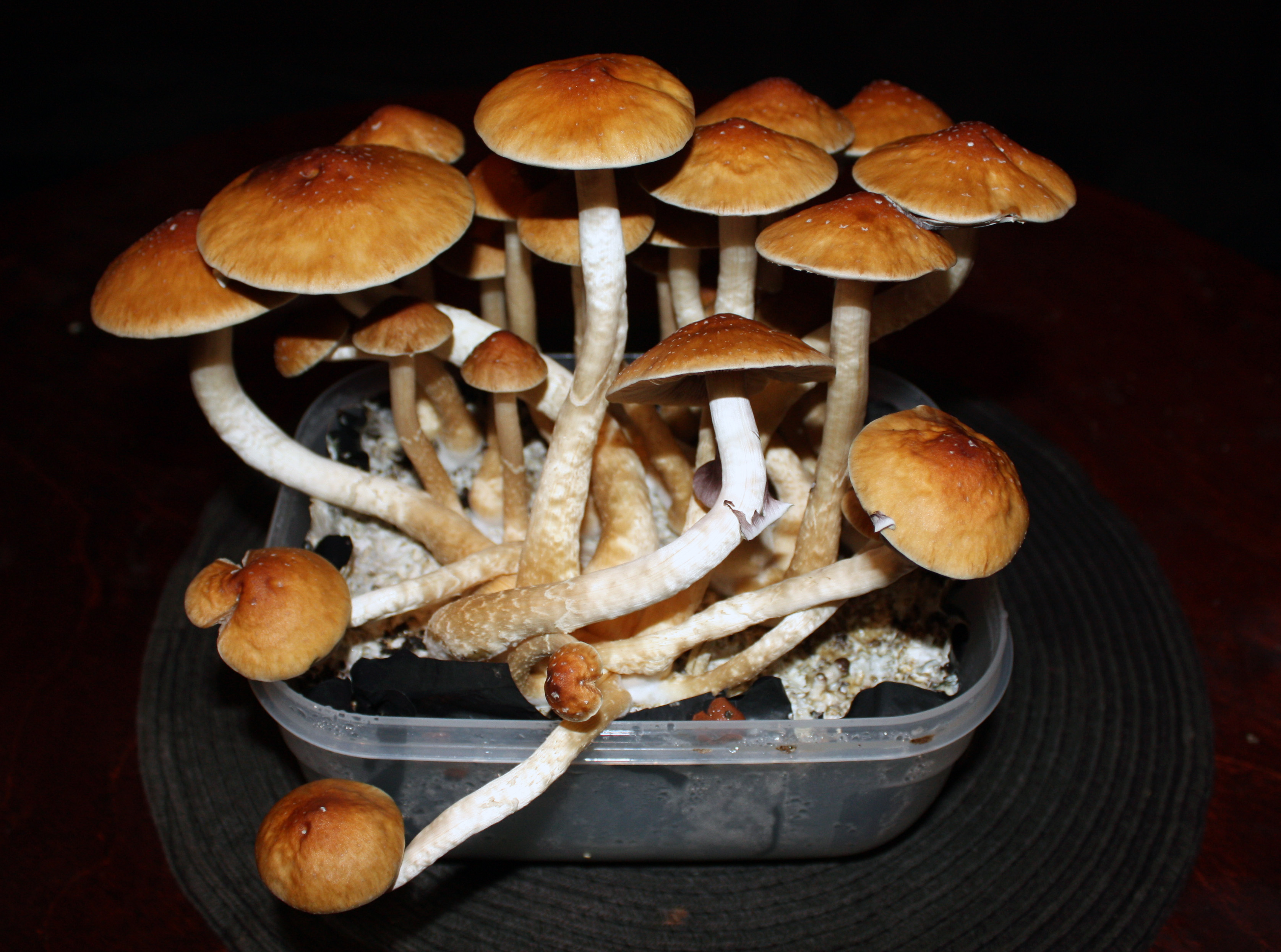 Psilocybe cubensis "Golden Teacher" kookoskuidussa.